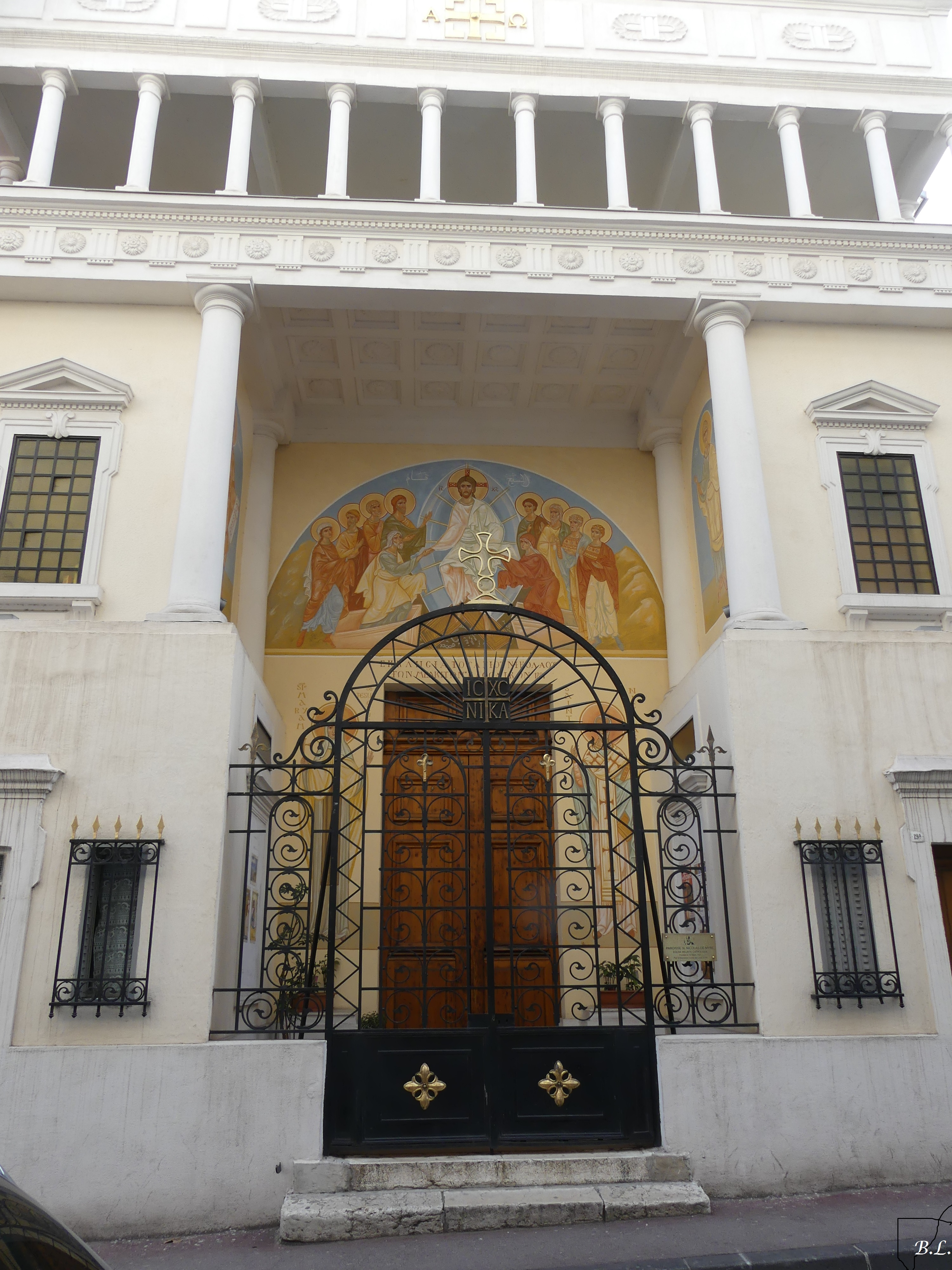 entrée rue Edmond Rostand